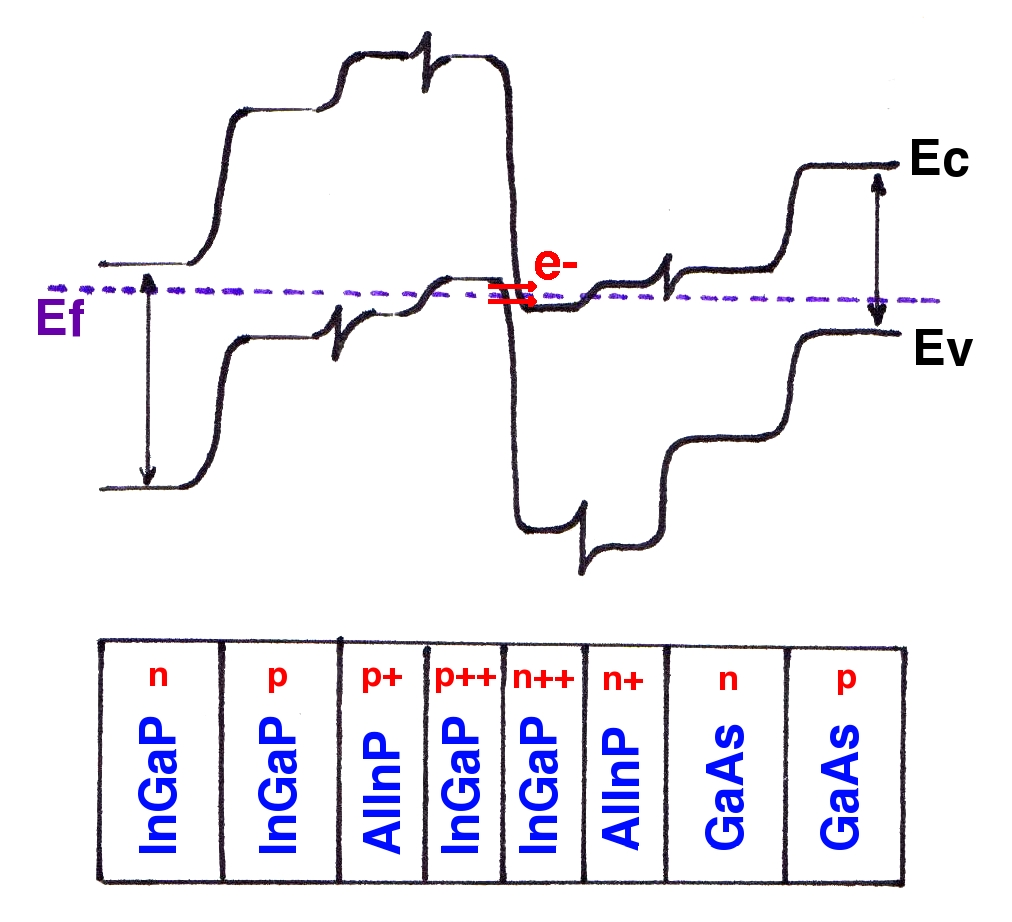 tunnel junction